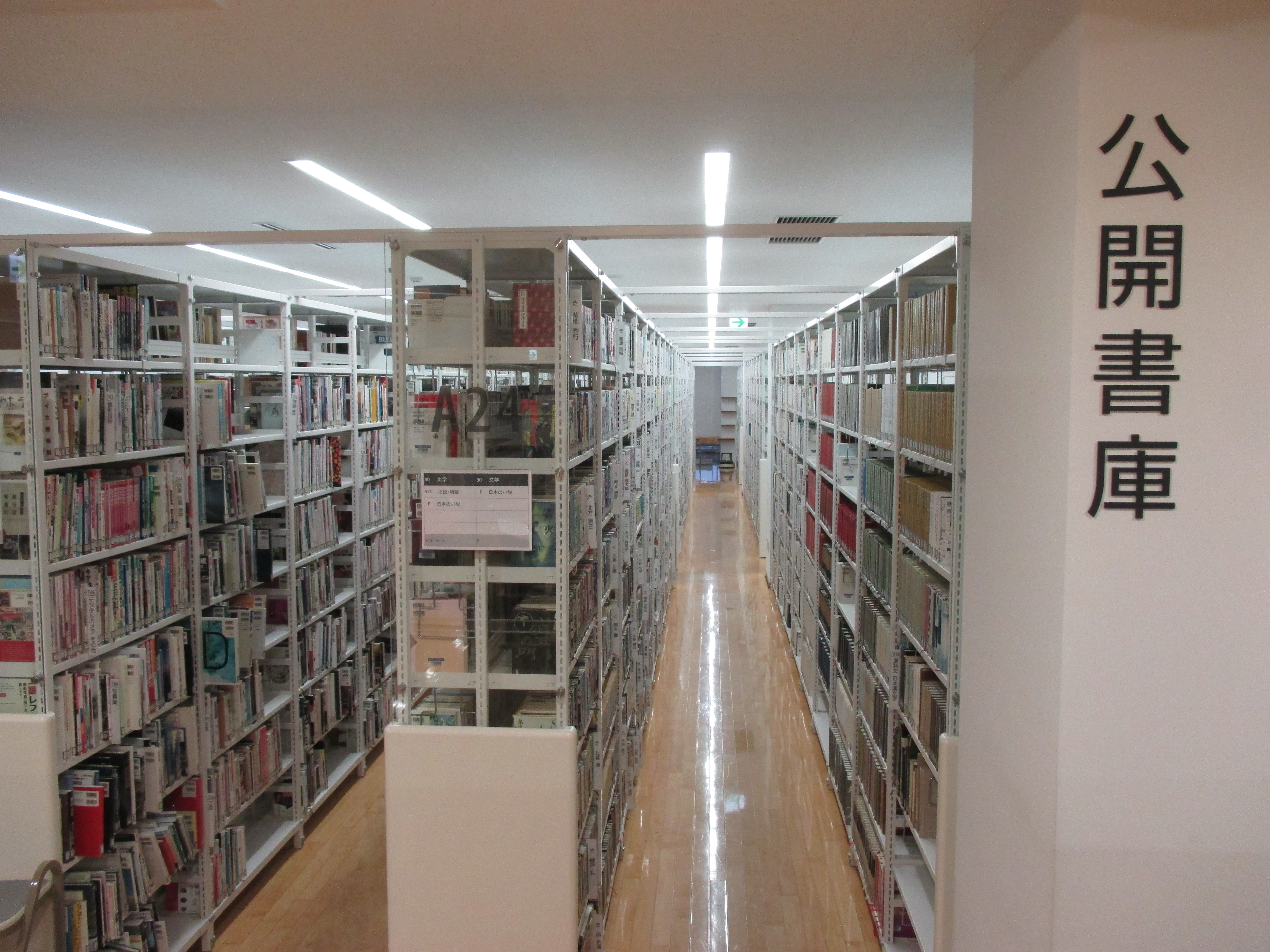 高崎市立中央図書館の公開書庫